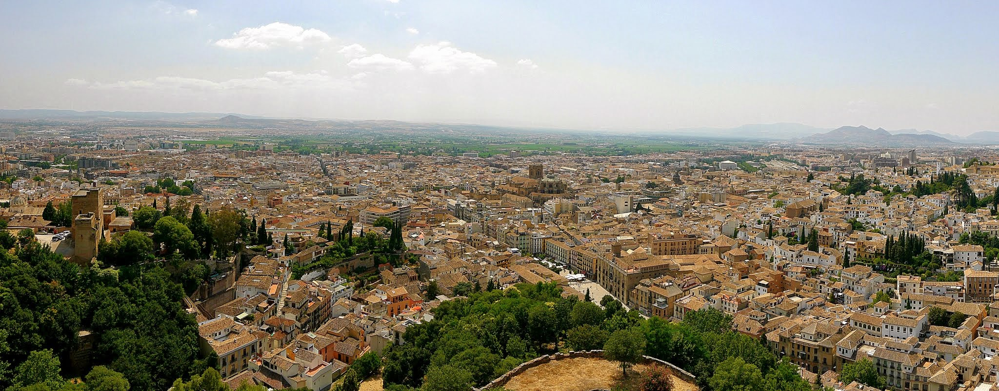 Blick auf Granada vom Alcazabar der Alhambra